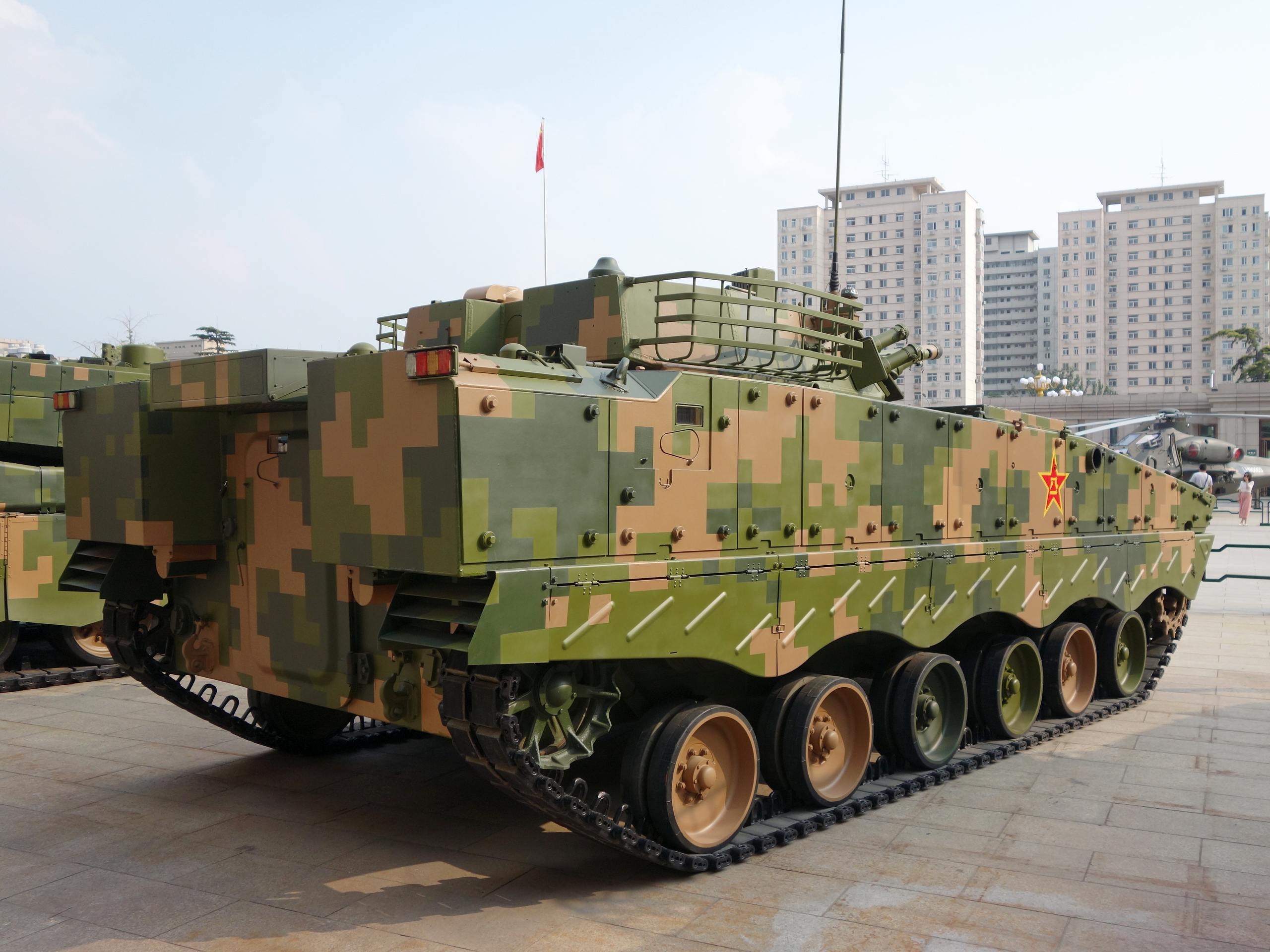 ZBD-04A步兵战车，拍摄于中国人民革命军事博物馆